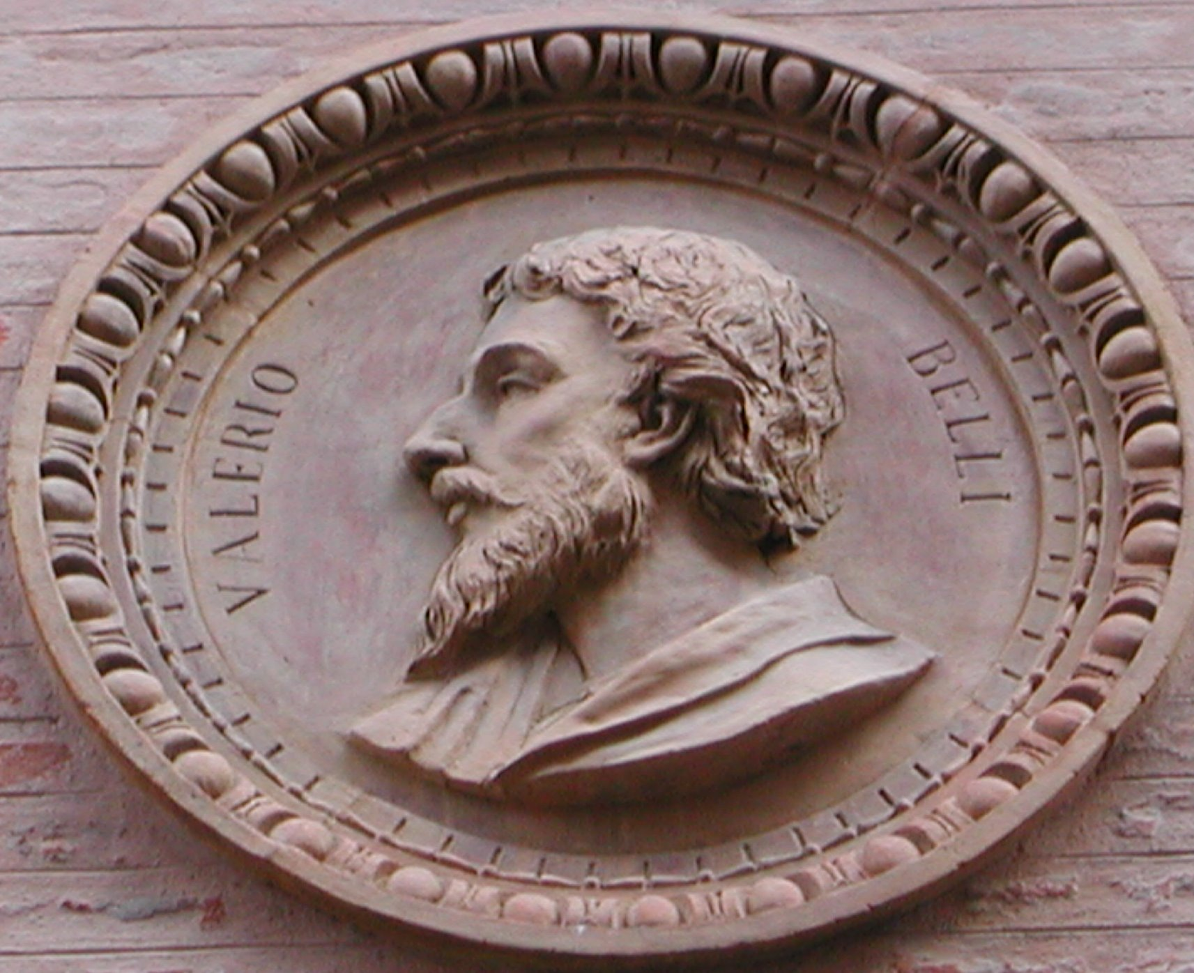 Bildnis von Valerio Belli ((* um 1468 in Vicenza; † 1546 ebenda), italienischer Gemmenschneider, am Palazzo Thiene in Vicenza Source: photo uploaded by User:RicciSpeziari. Photographer: Riccardo Speziari